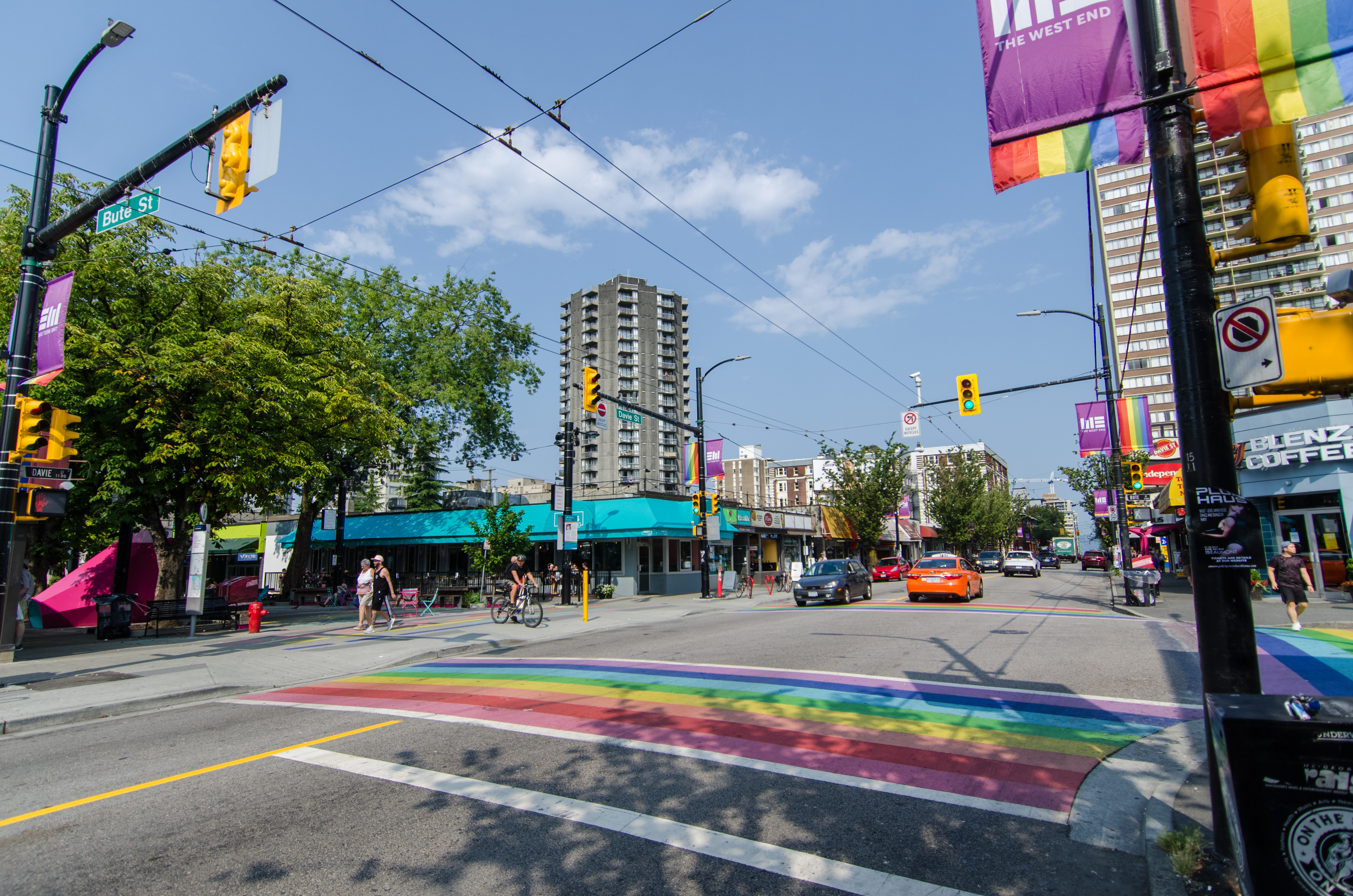 Davie Street & Bute Street, West End